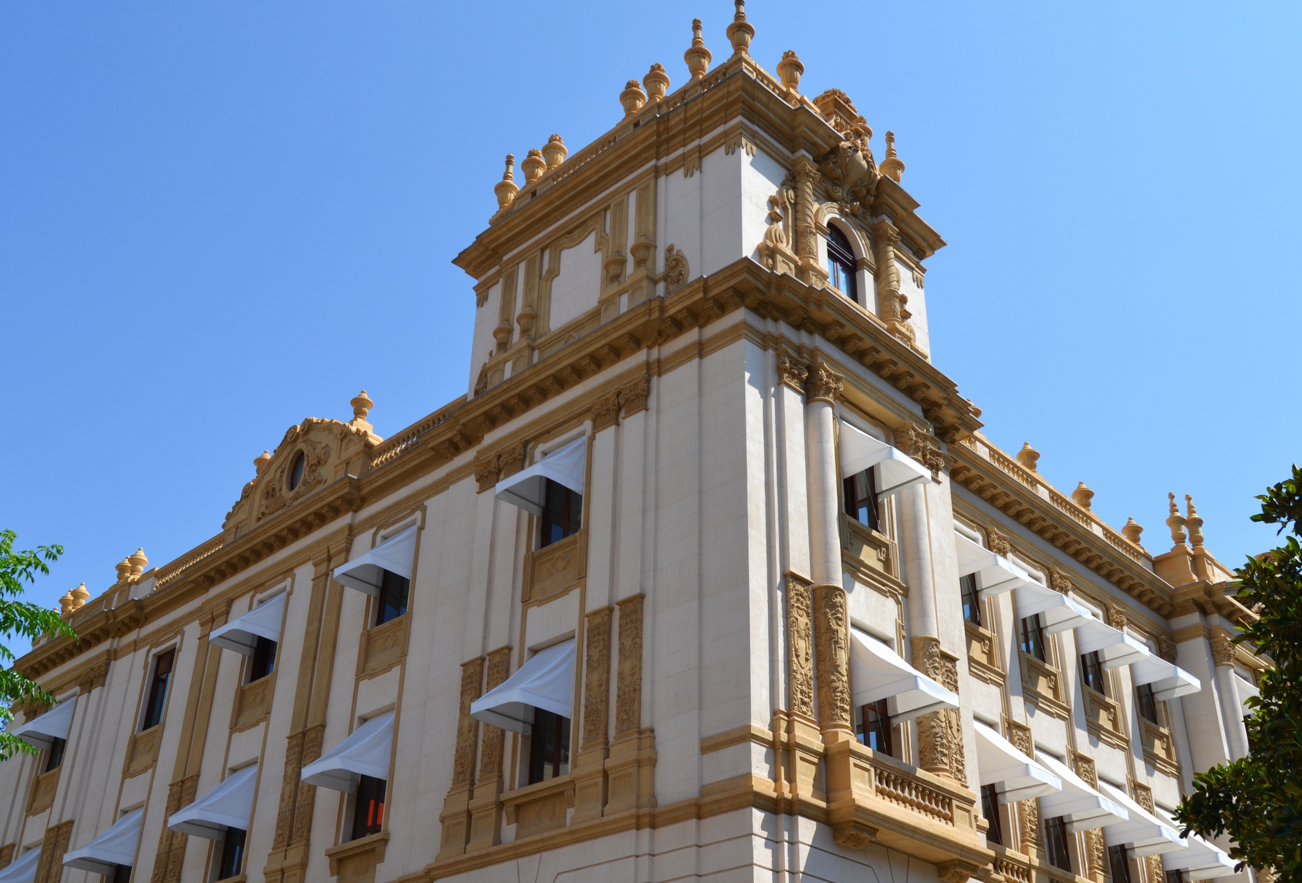 Palau de la Diputació, Alacant, l'Alacantí.